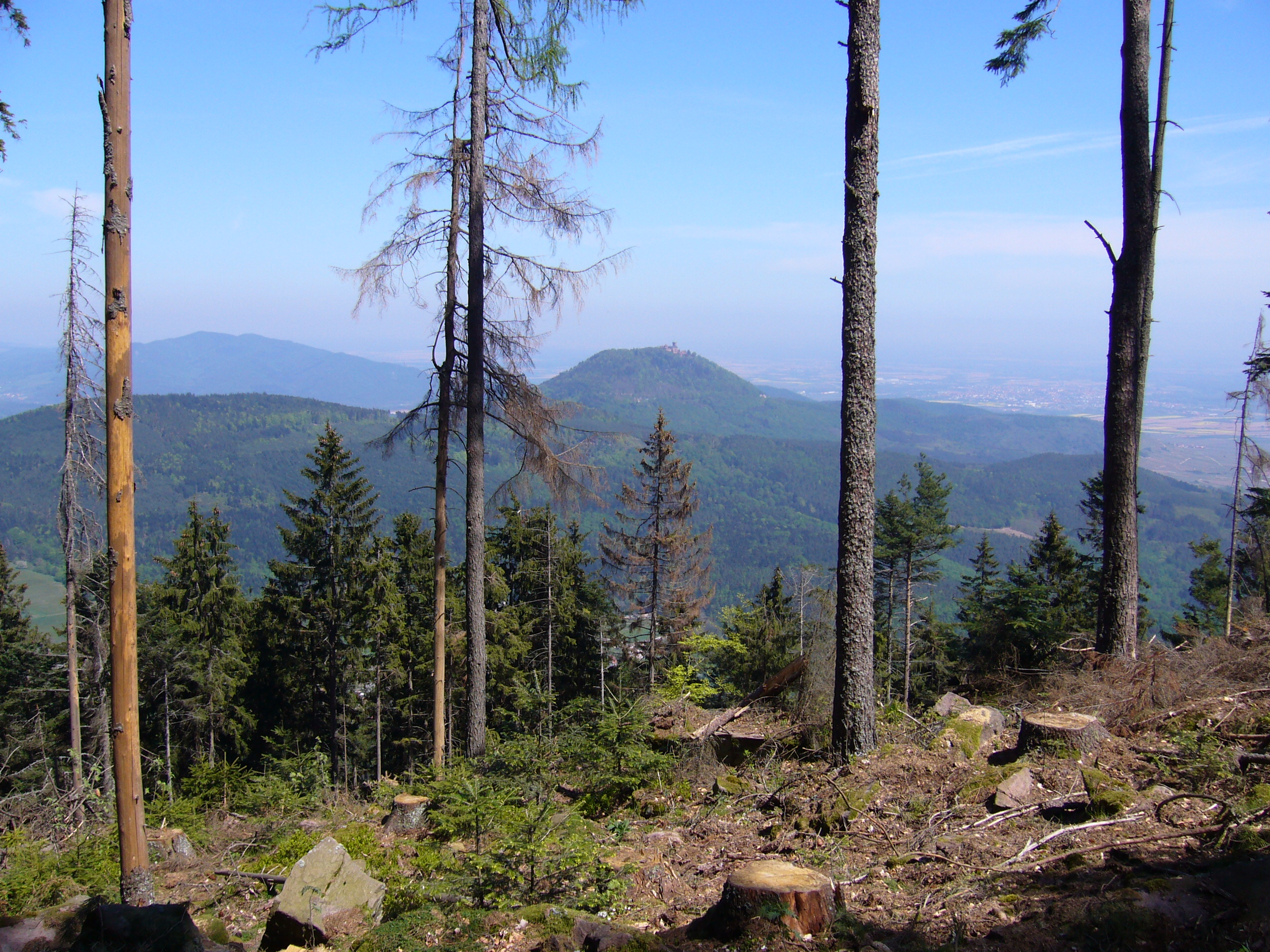 Taennchel 485.JPG